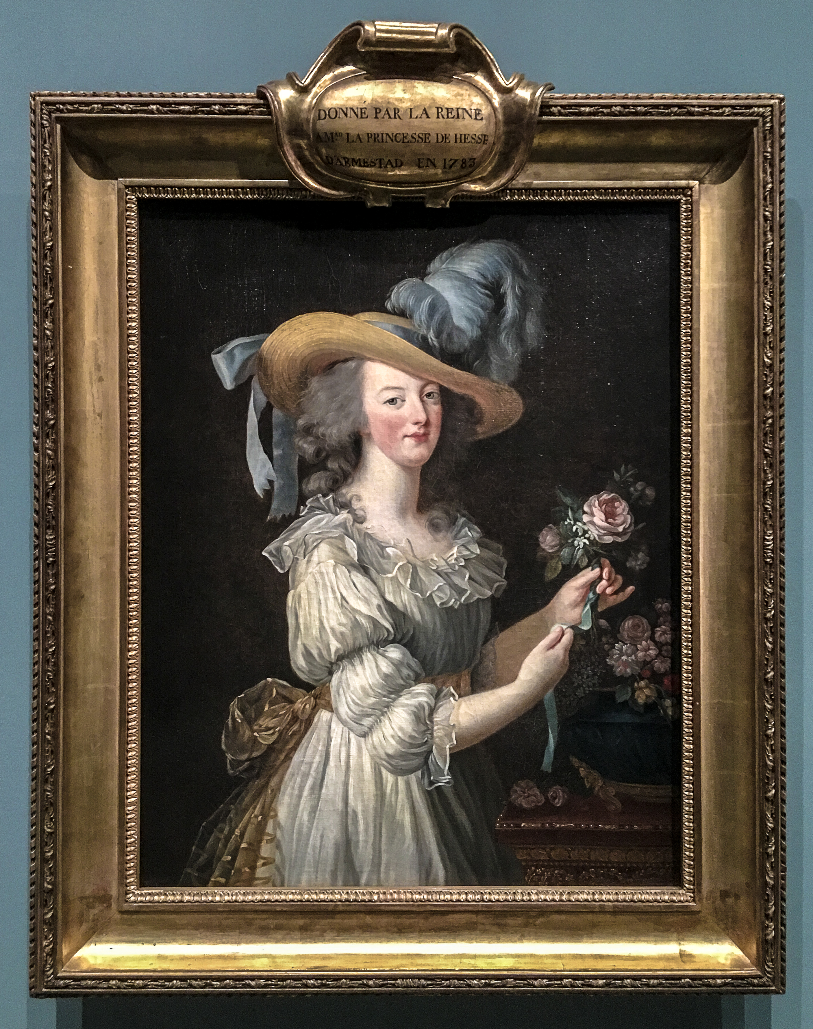 Exposition rétrospective Elisabeth Louise Vigée Le Brun au Grand Palais à Paris, 23 September 2015 to 11 January 2016.